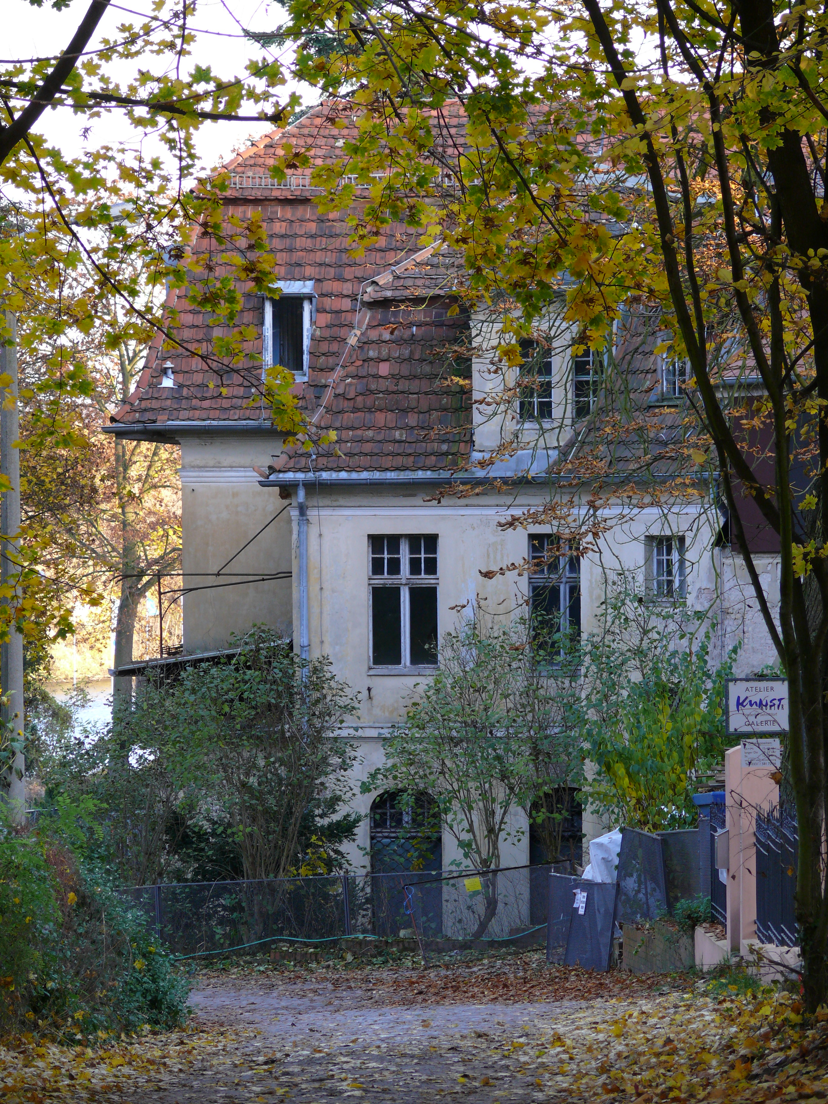 Villa Gutmann (auch Herbertshof genannt), Potsdam, Bertinistrasse 16, Bauherr Herbert Maximilian Gutmann, Aufnahme 2007